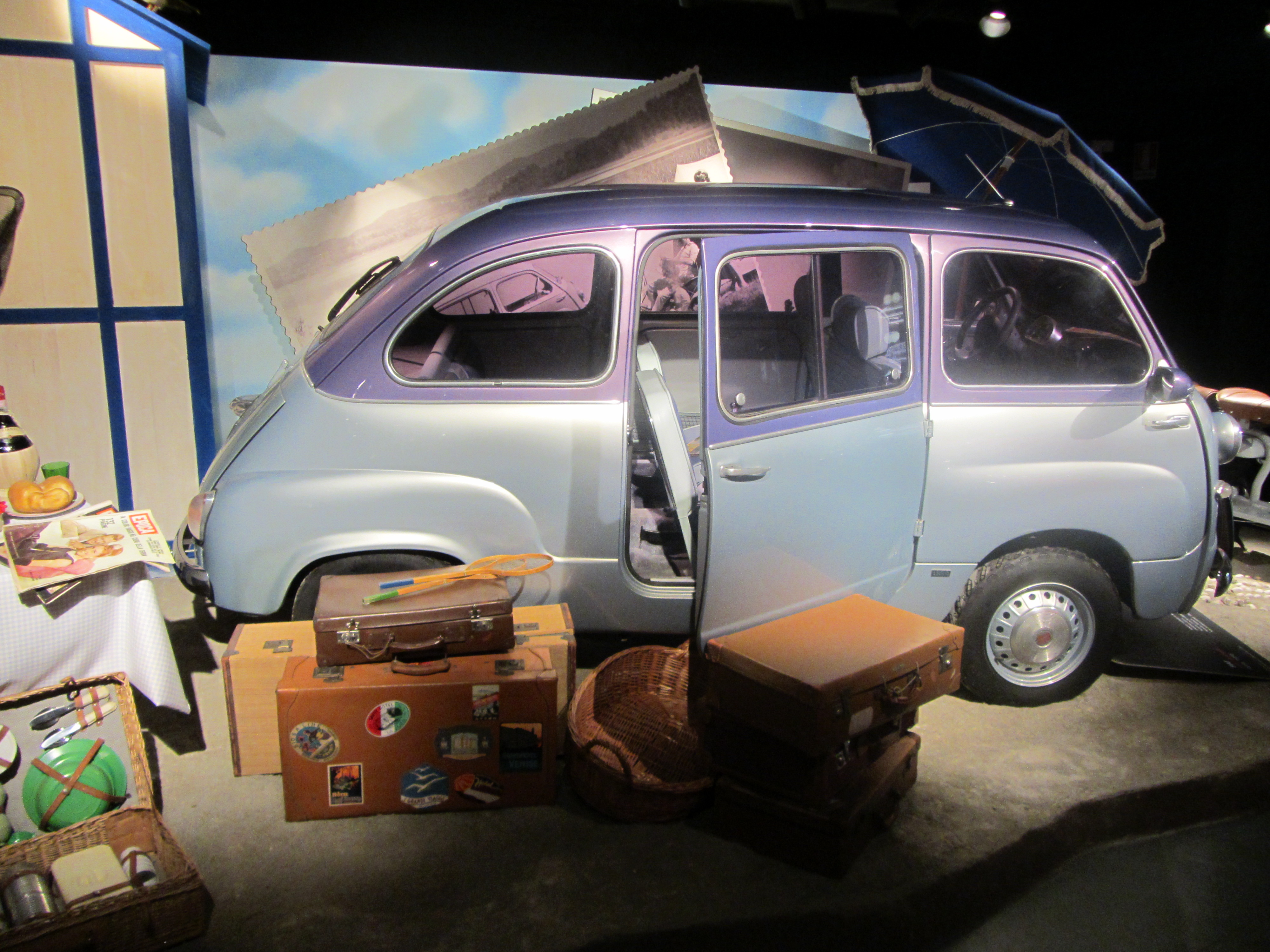 Fiat 600 Multipla con scenografia dedicata al Museo Nazionale dell'Automobile di Torino (dopo restauro 2011) Dati veicolo: Fiat 600 Multipla - Italia 1956 - Motore 4 cilindri in linea, 633cc - 21,5 CV a 4600 giri/min - Velocità Max: 90 km/h - peso a pieno carico: 1150 kg Donato al Museo Nazionale dell'Automobile di Torino da: Indea Institute, Moncalieri (Torino)